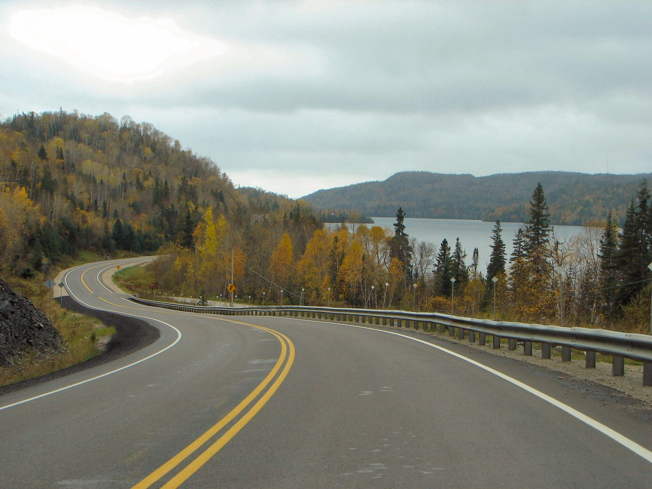 Highway 101 at Wawa Lake, Ontario, Canada